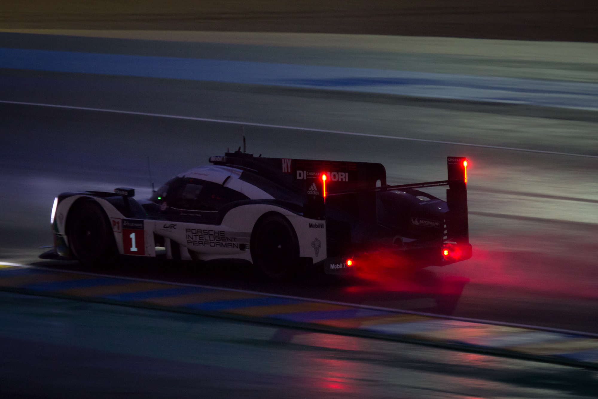 Drivers: Timo Bernhard, Mark Webber, Brendon Hartley